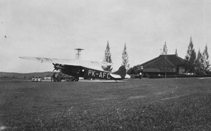 Foto. Een Fokker vliegtuig op vliegveld Simongan